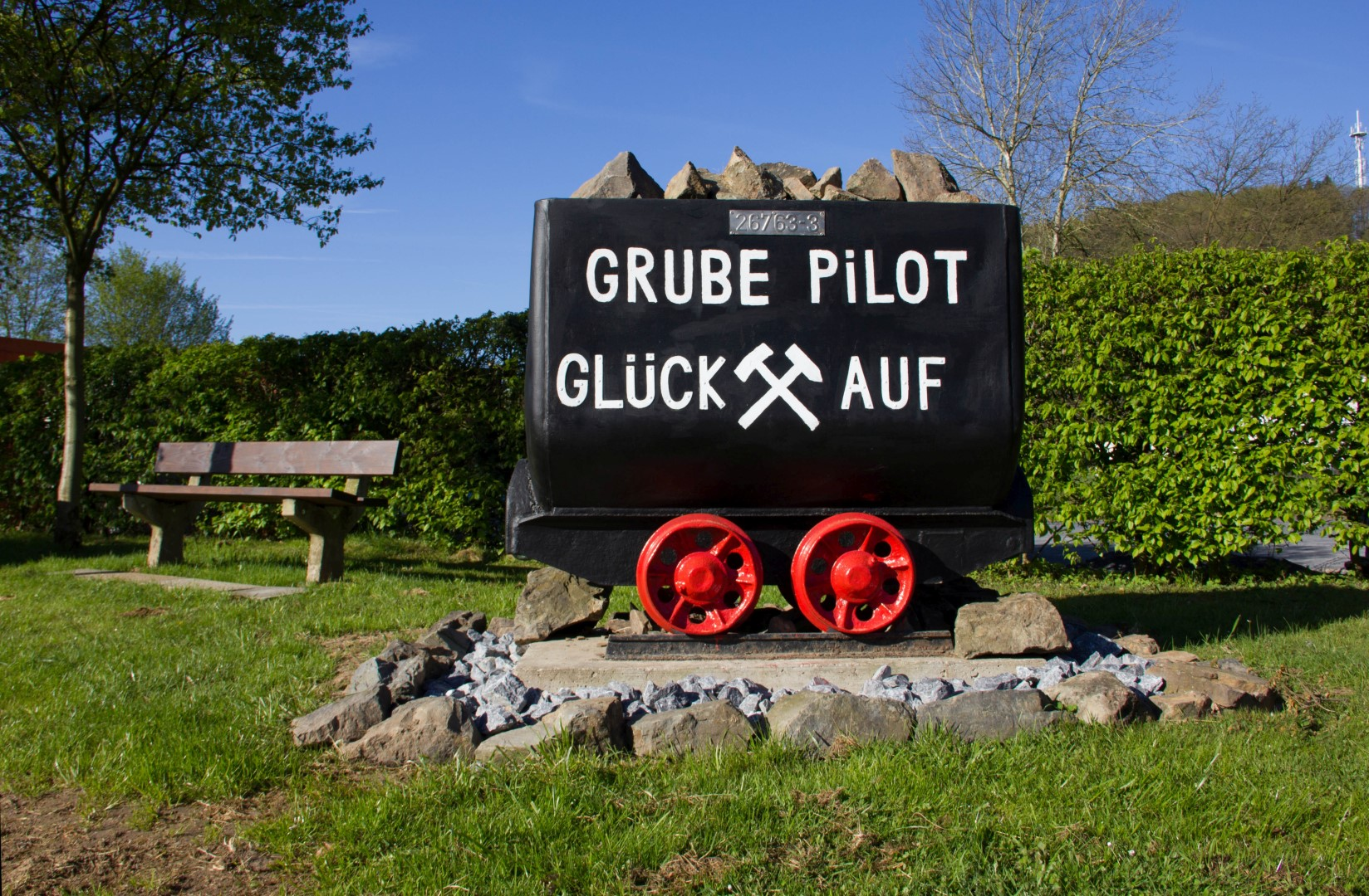 Lore der ehemaligen Grube Pilot auf der Museumsmeile des Verkehrs- und Verschönerungsverein Wahlscheid / Aggertal e.V. in Wahlscheid (Lohmar) am 16. April 2014